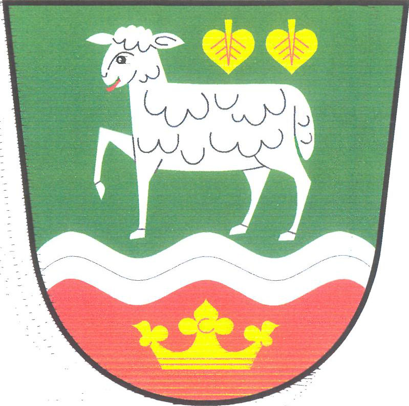 Znak obce Vysoký Újezd